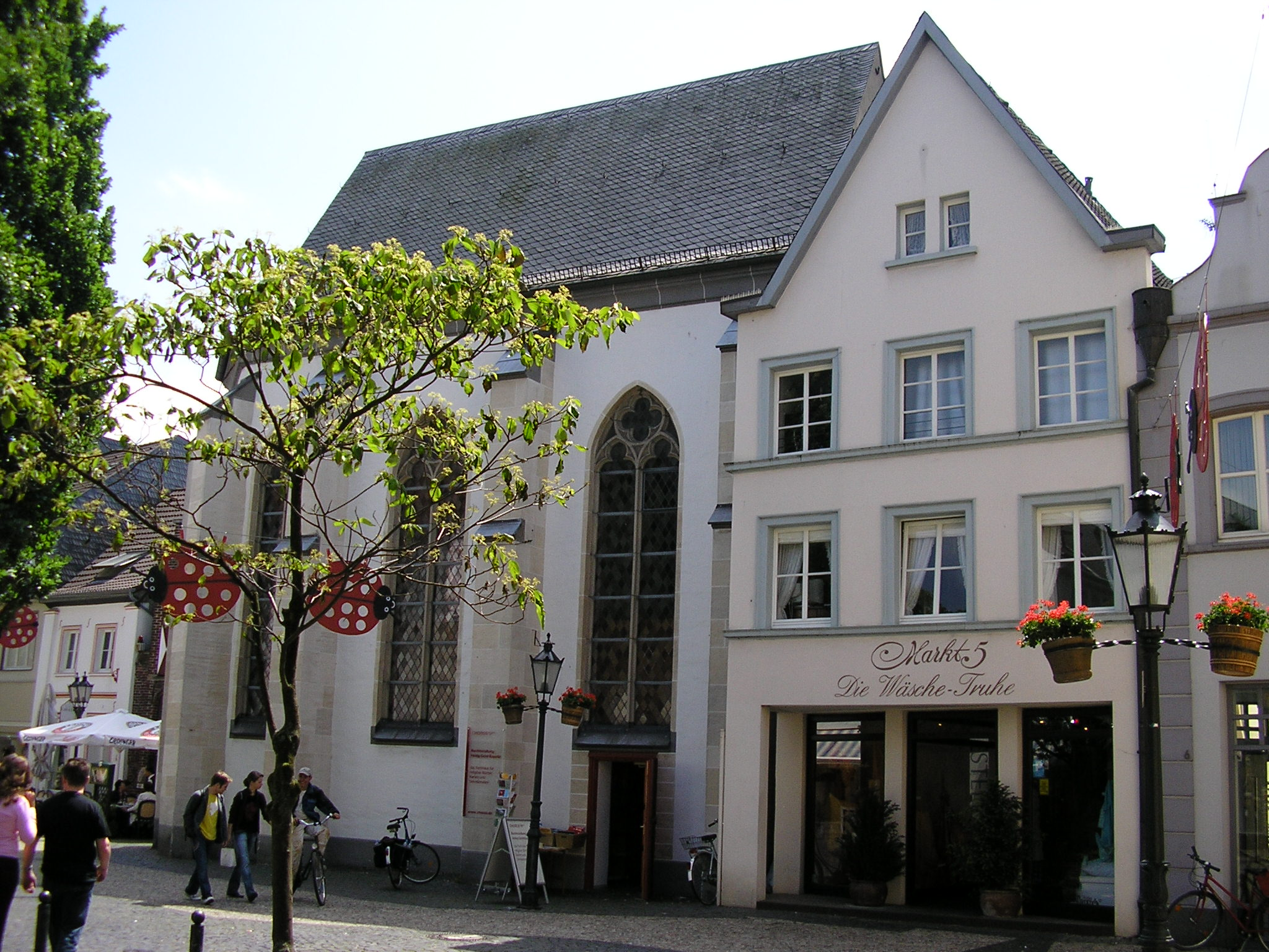 Heilig-Geist-Kapelle zu Kempen, Kreis Viersen This image shows a heritage building in Germany, located in the North Rhine-Westphalian city Kempen (no. 4).